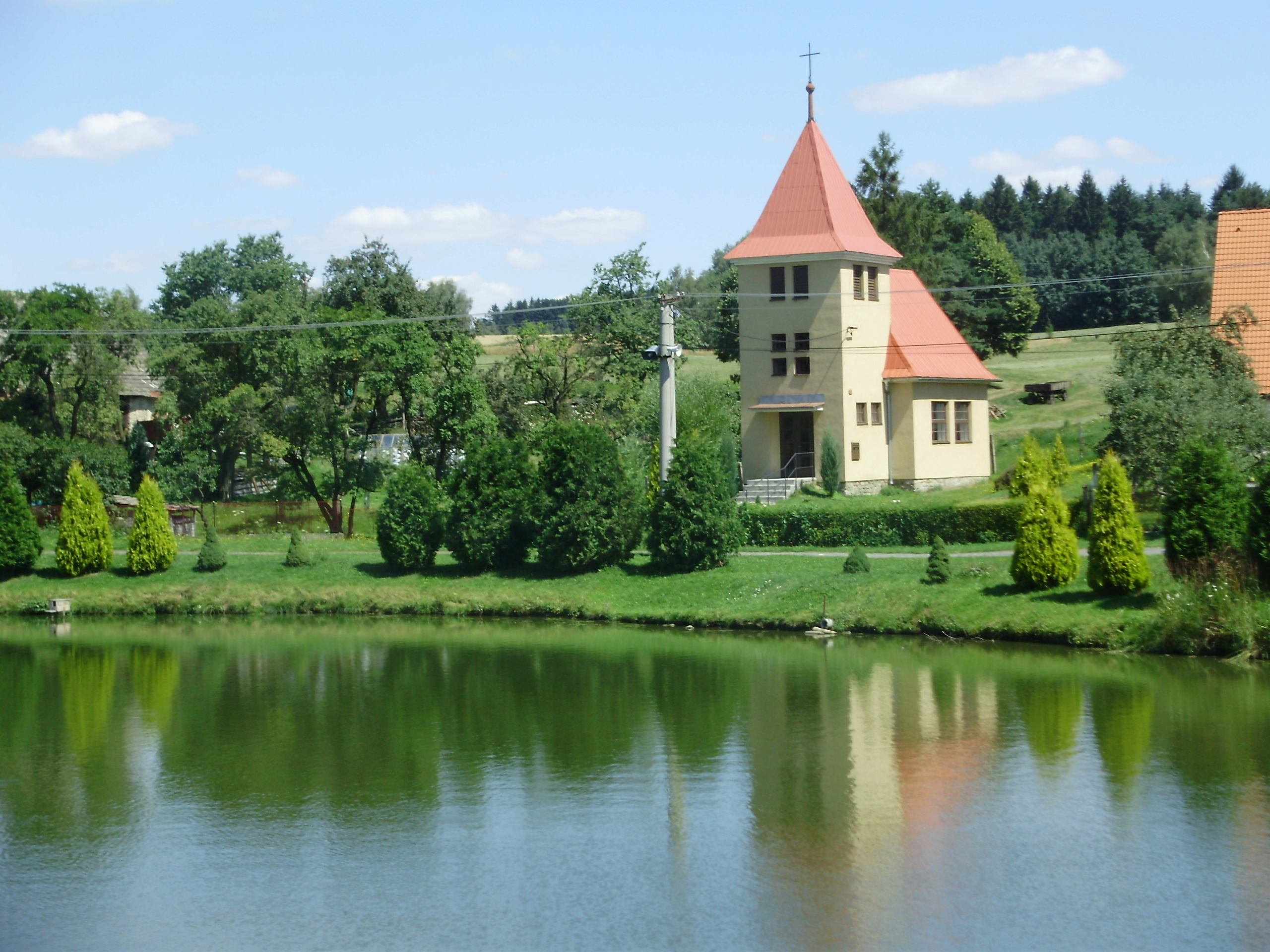 Věchnov (Czech republic)